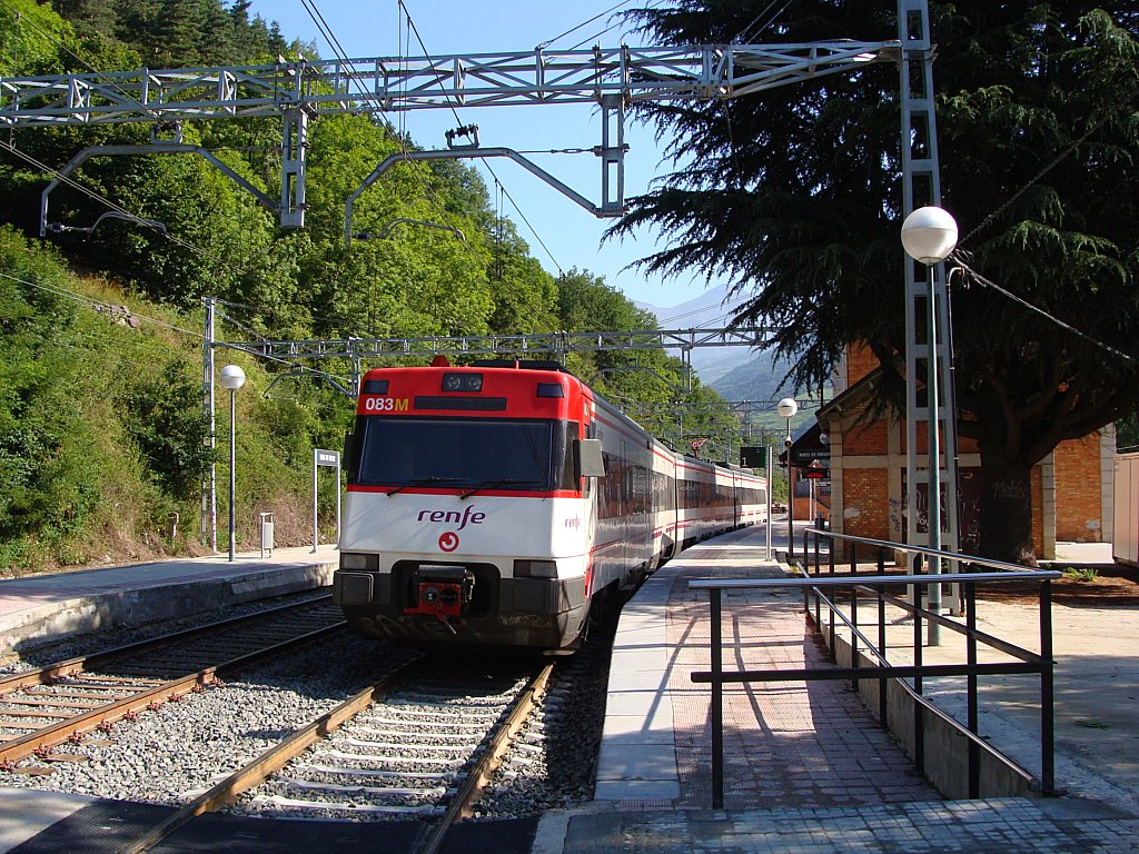 Unidad 447 en la estación de Ribes de Freser.